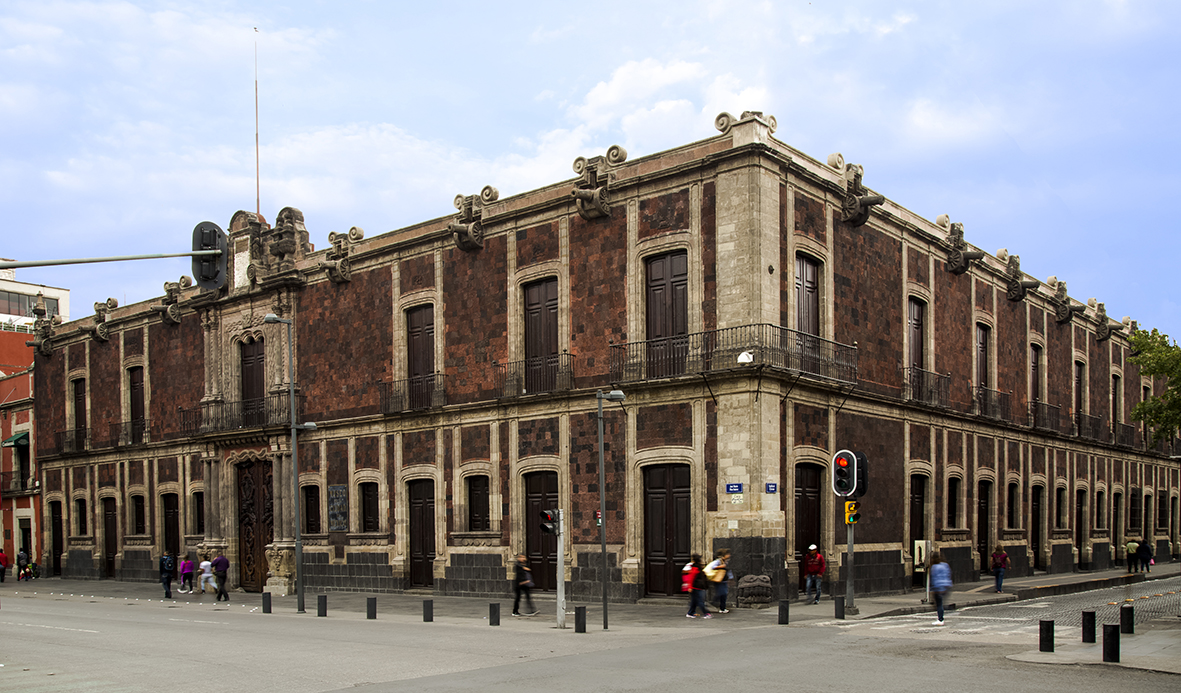 Registro del Museo de la Ciudad de México